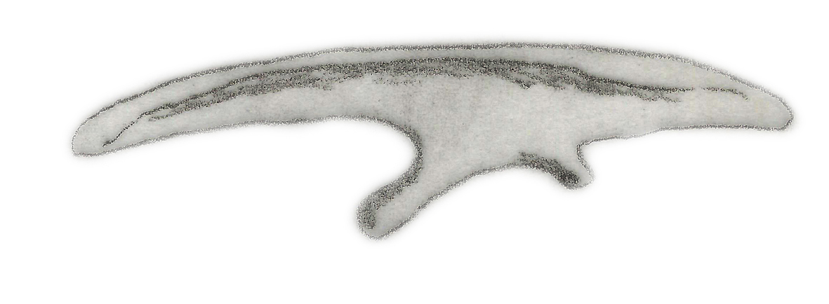 Illustration of a fossil of Micropachycephalosaurus